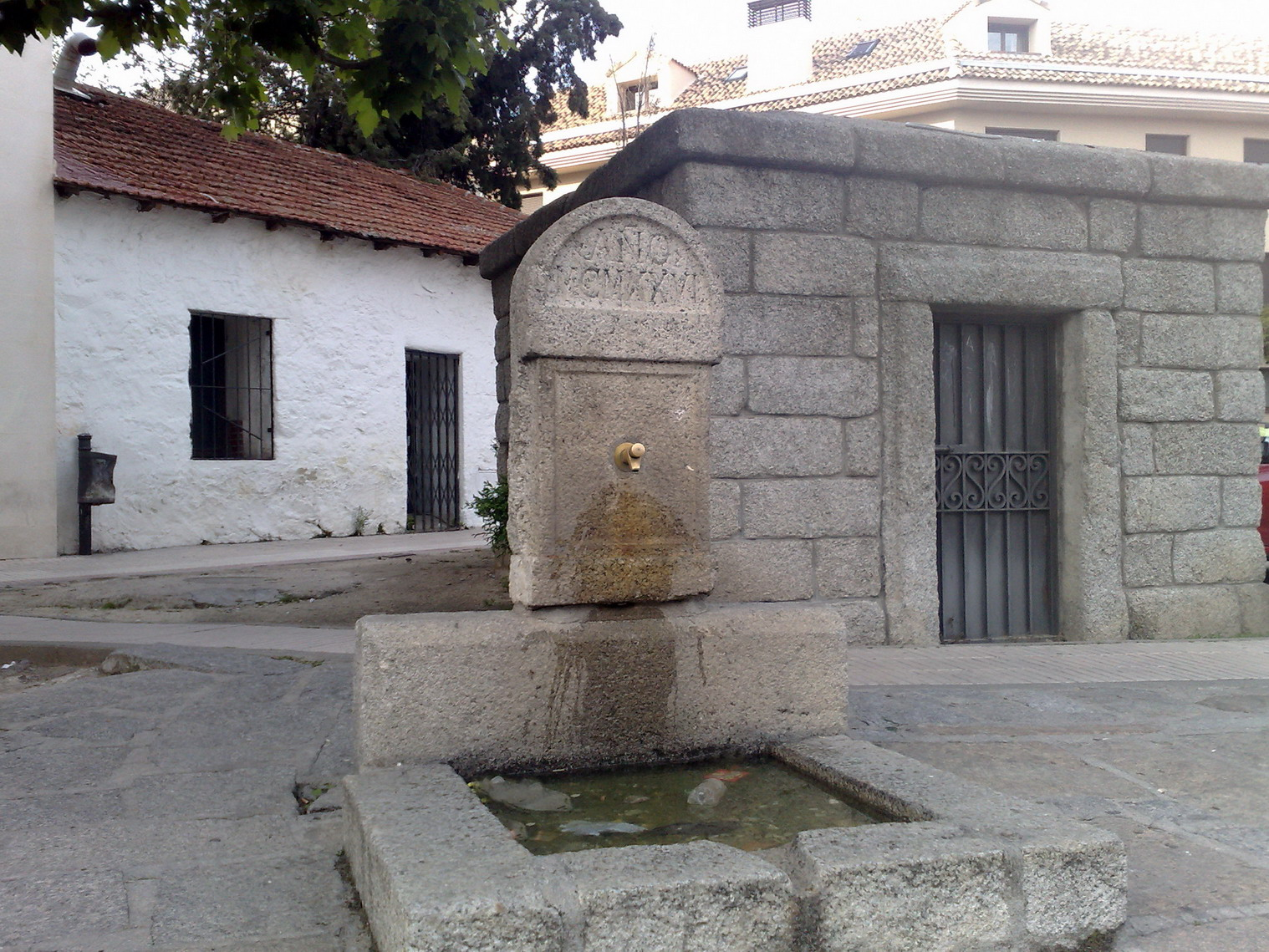 Torrelodones. Fuente situada en calle Carlos Picabea, detrás de la Iglesia.